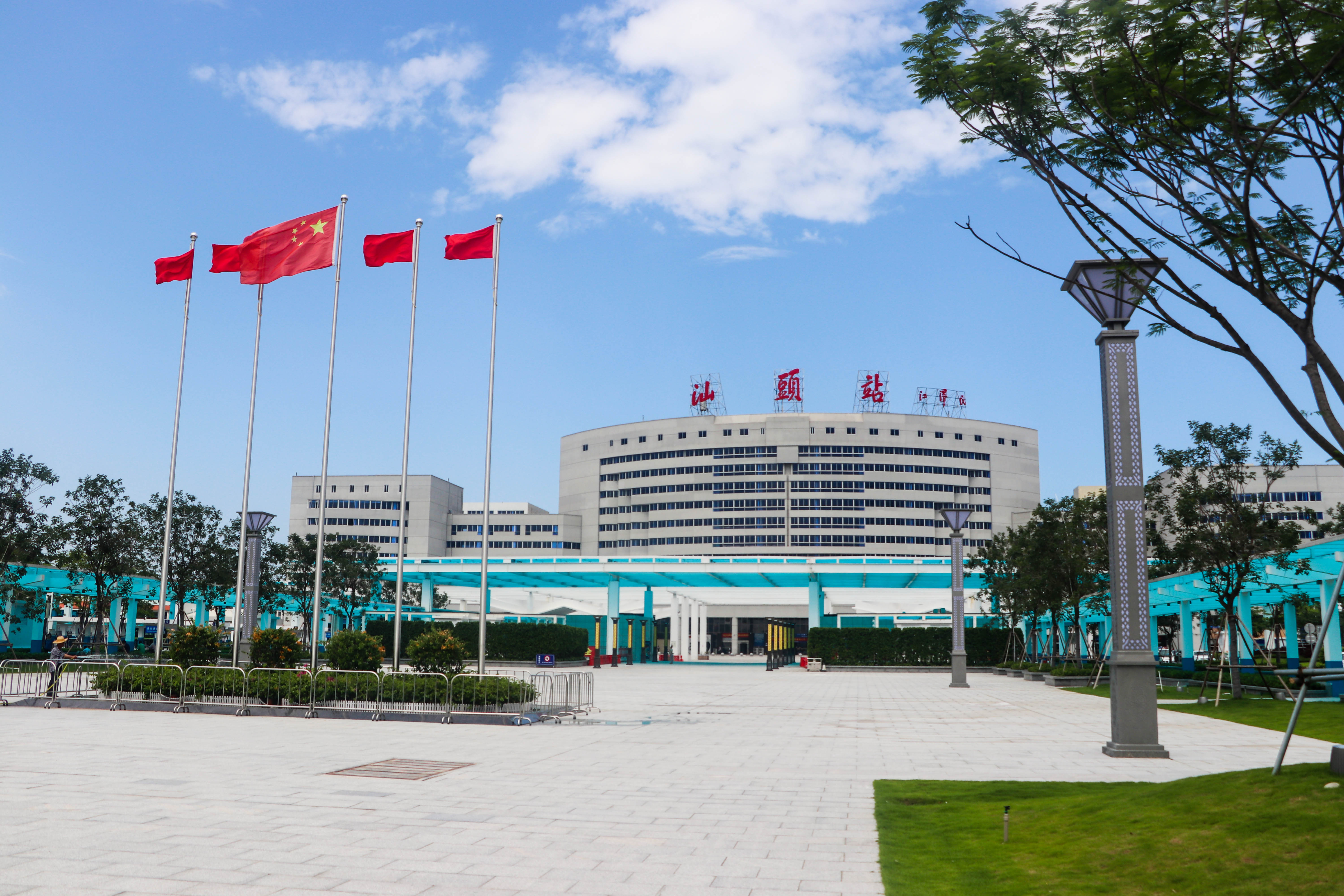 汕头站站房